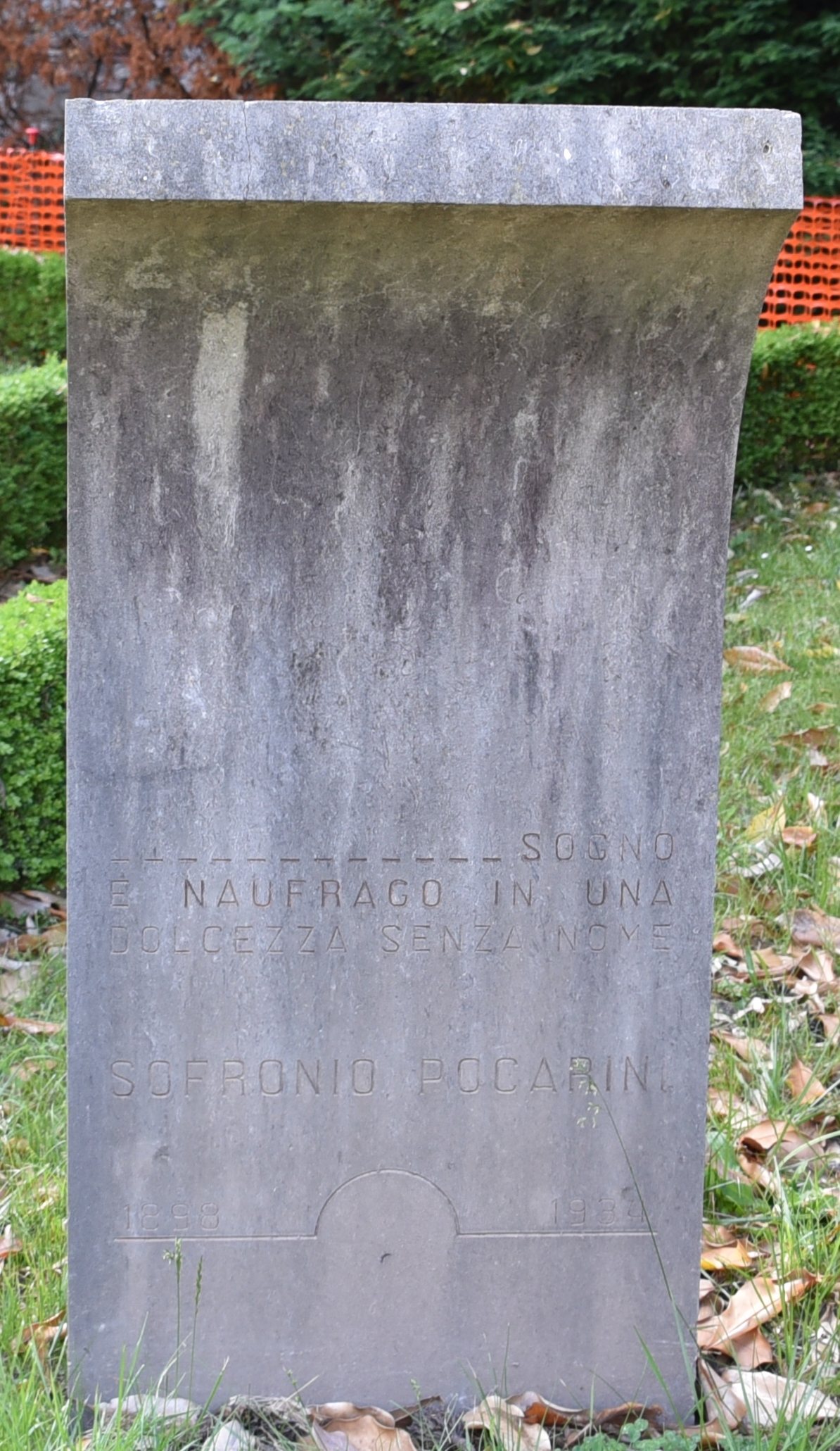 Denkmal für Sofronio Pocarini in Gorizia